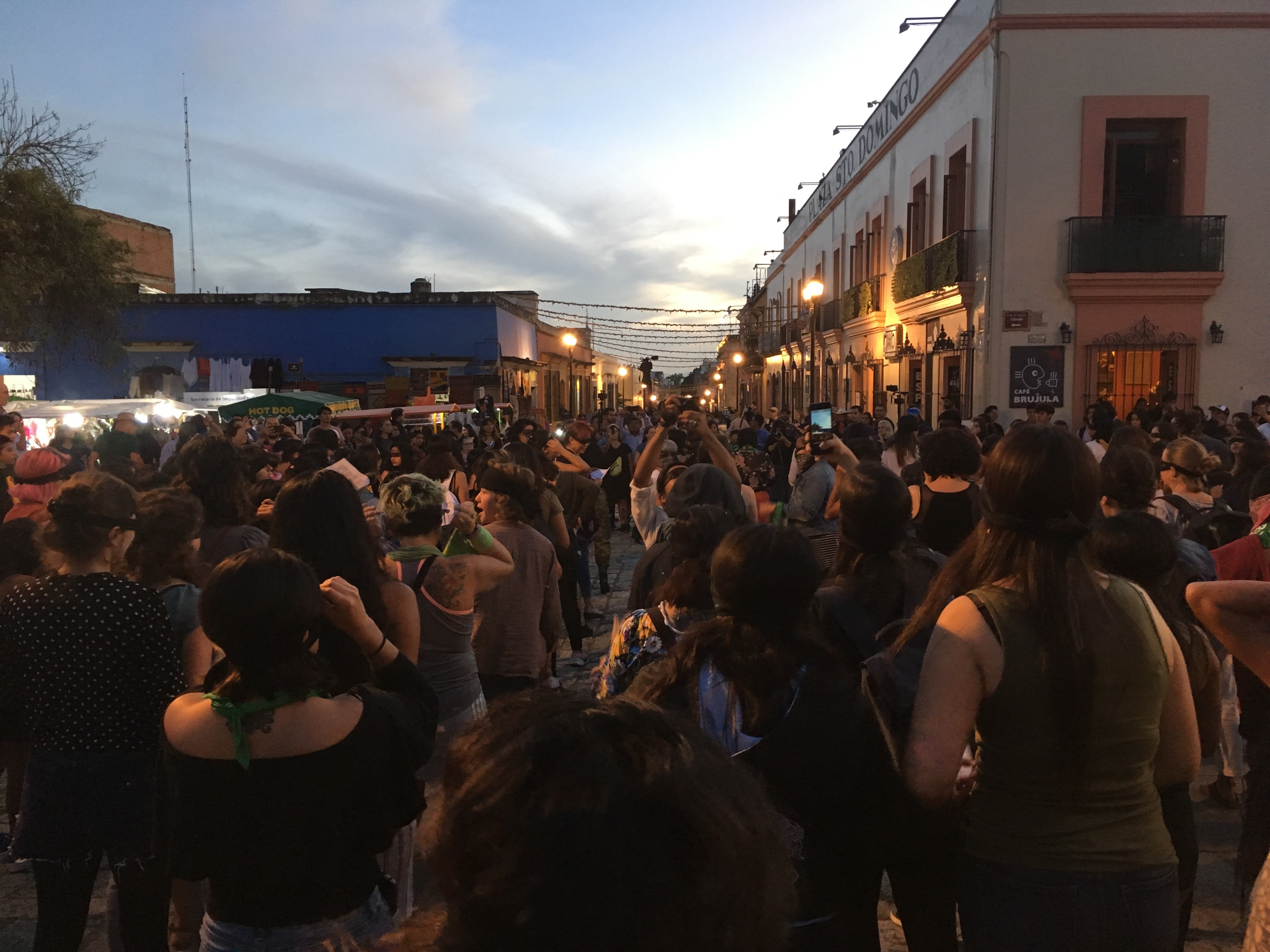 Manifestación feminista en apoyo a La Tesis, 29 de noviembre 2019, Un violador en tu camino, performance Oaxaca 2019, Andador Turistico Macedonio Alcala en Oaxaca, frente a Santo Domingo